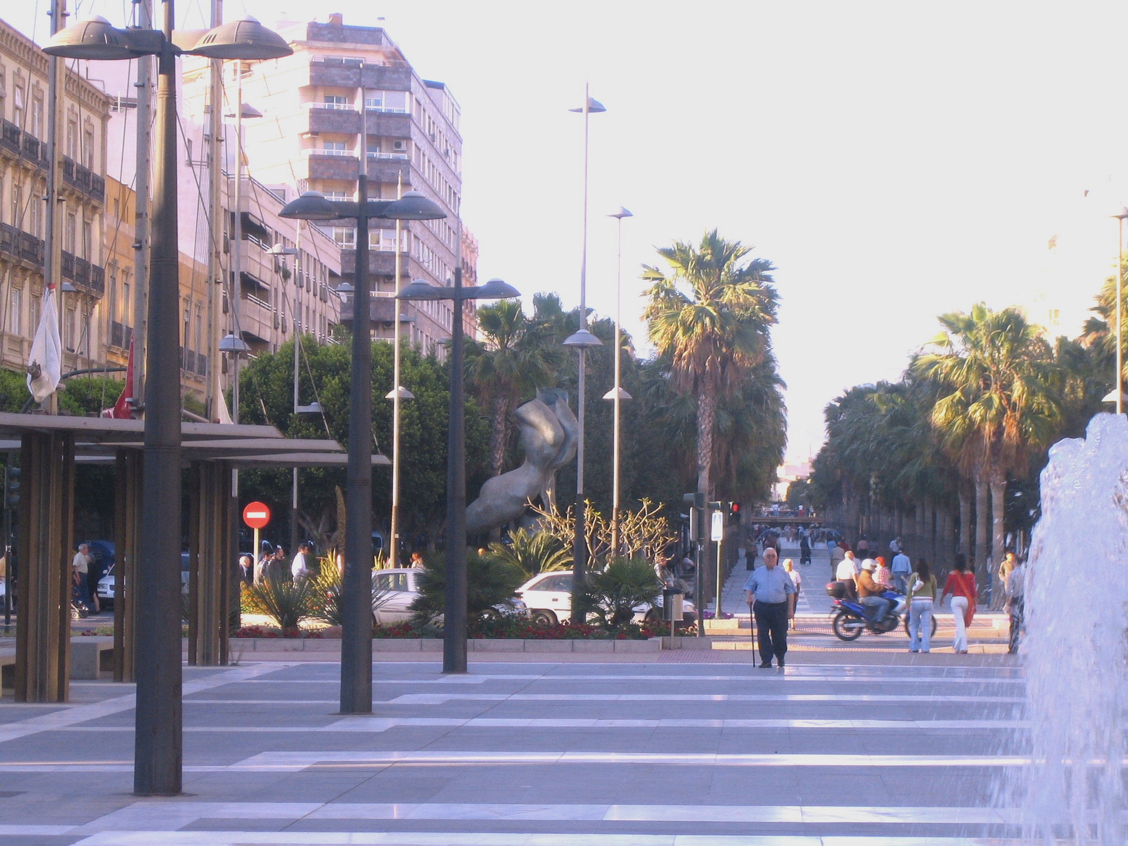 Rambla de Almería (España)